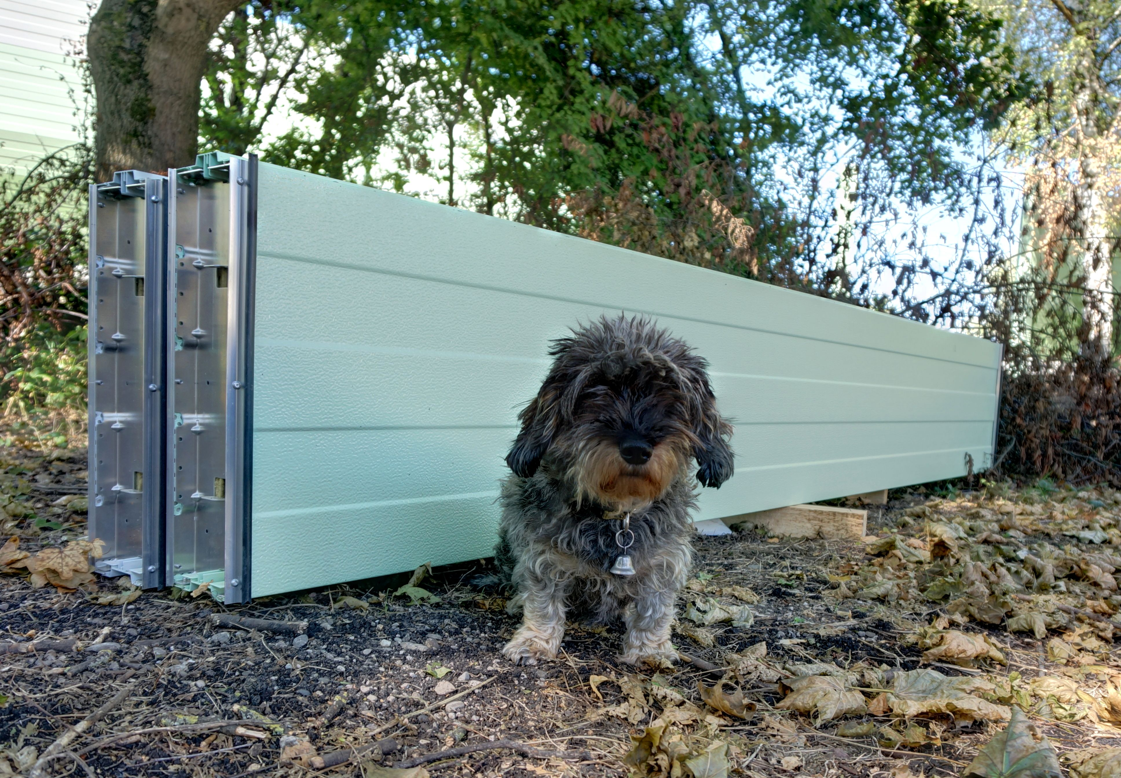 Schallschutzmauer-Elemente aus Leichtmetall mit Hund